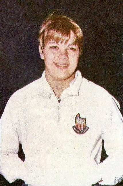 CAMPIONI dello SPORT 1969/70-n.274- MEYER - USA - NUOTO